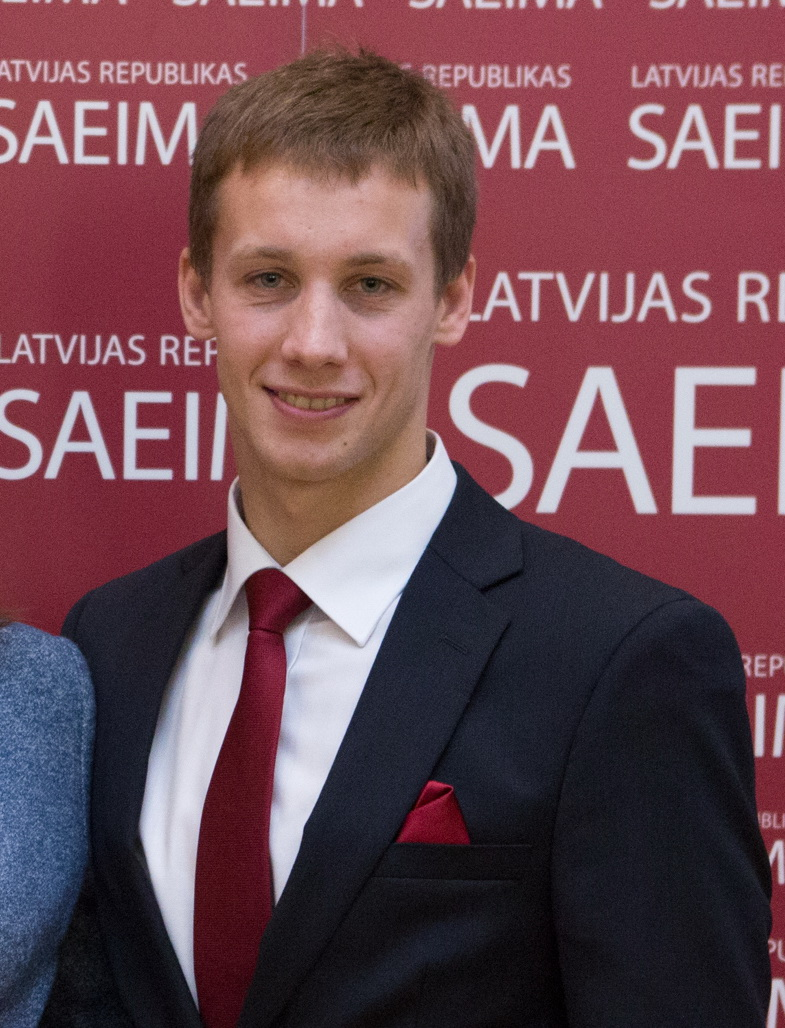 2015.gada 27.oktobris. Latvijas pilsoņa pases pasniegšana pieccīņniekam Ruslanam Nakoņečnijam par īpašiem nopelniem mūsu valsts labā. Foto: Ernests Dinka, Saeima Izmantošanas noteikumi: saeima.lv/lv/autortiesibas